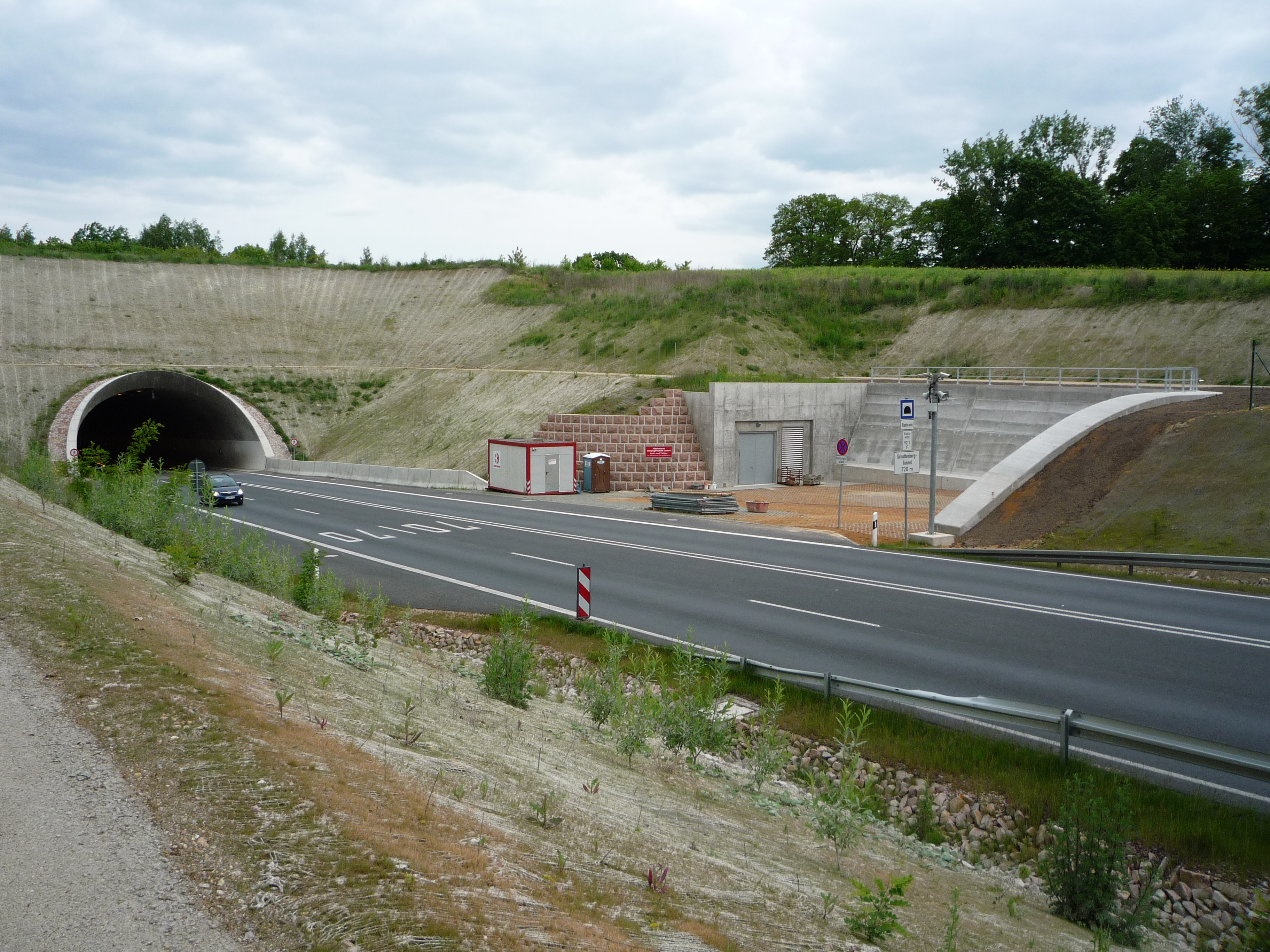 Die westliche Einfahrt des Schottenbergtunnels und dazugehörigen Rettungstunnel nebst davorliegendem Rettungsplatz